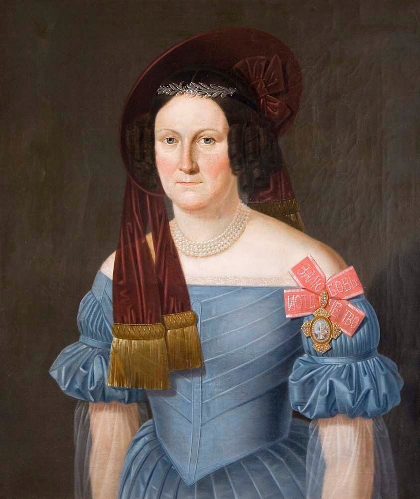 Баронесса Екатерина Вильгельмина Пален, урожденная Арвелиус (1800—1869)